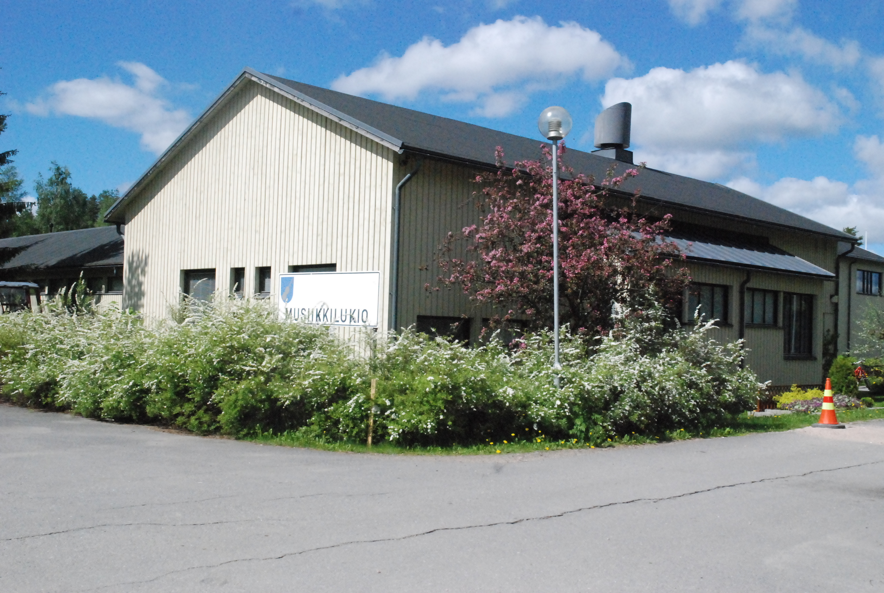 Kaustisen musiikkilukio